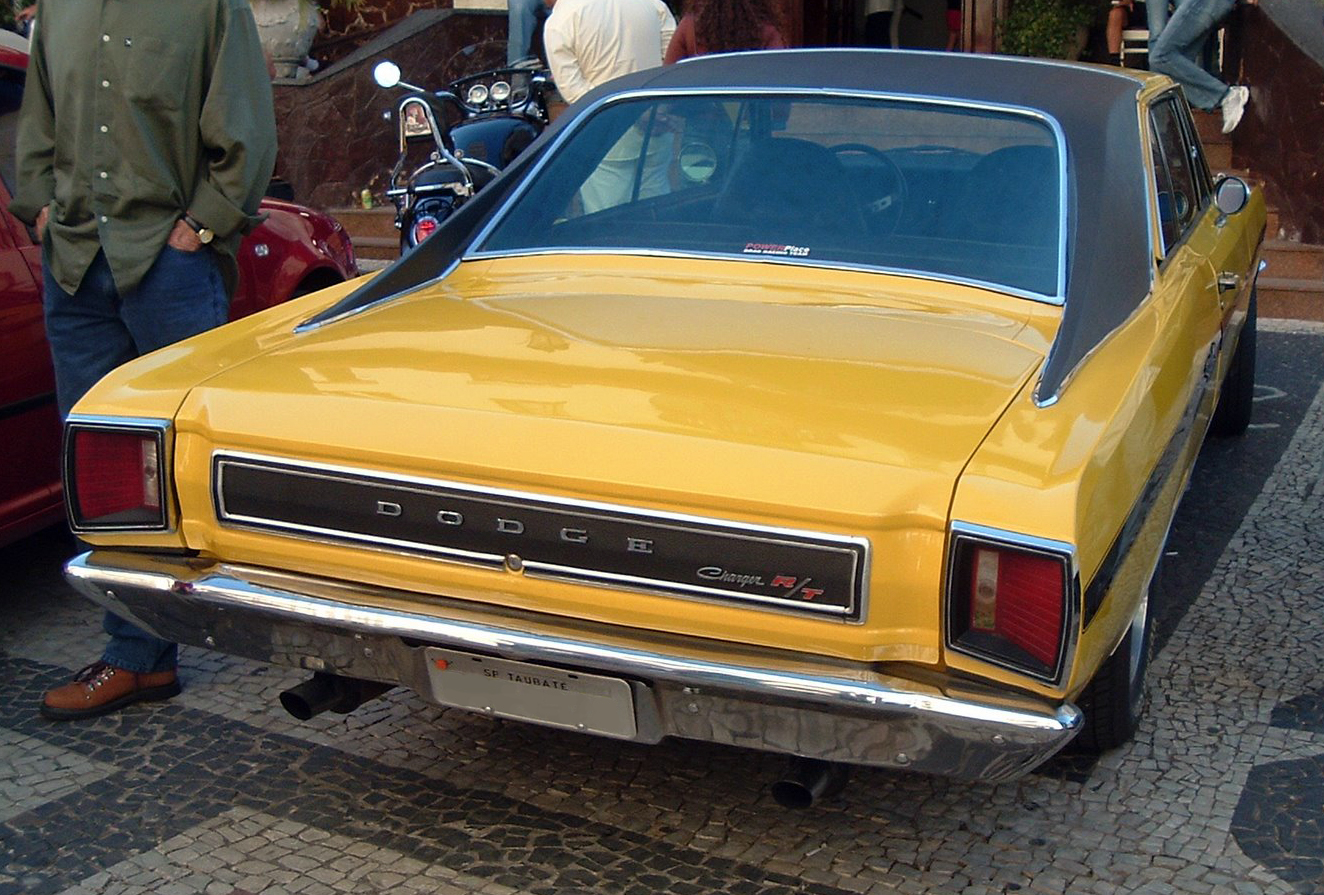 1975 Dodge Charger R/T